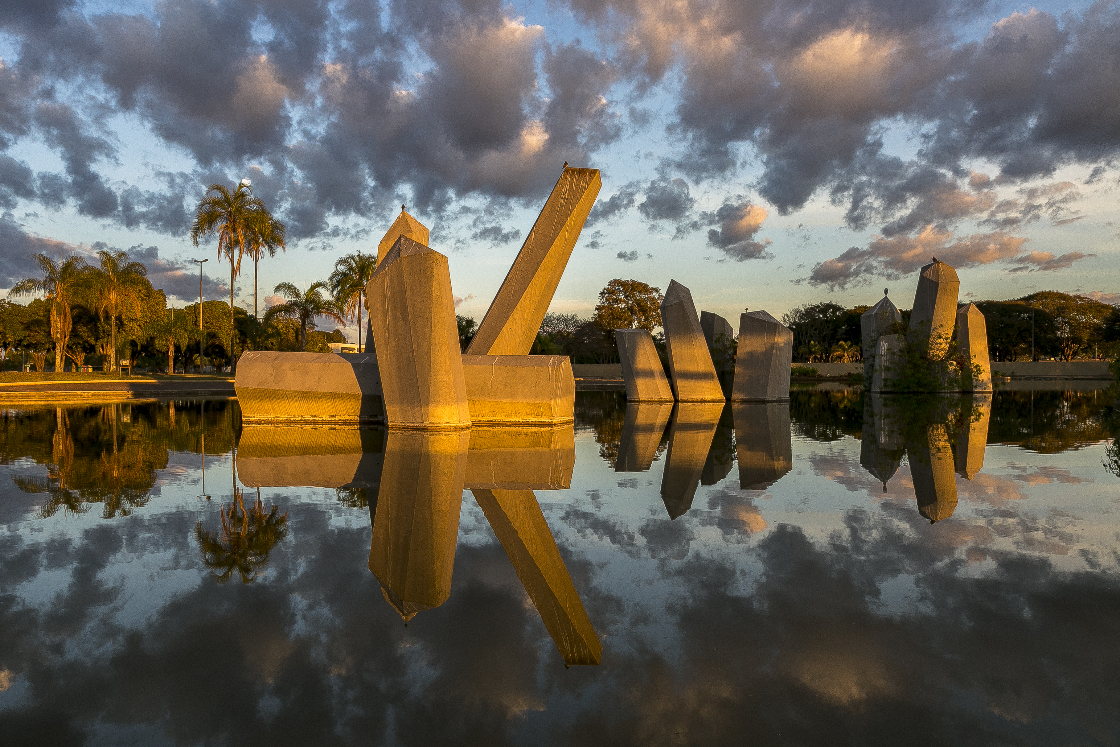 Praça dos Cristais durante o amanhecer. Brasília - DF - Brasil.